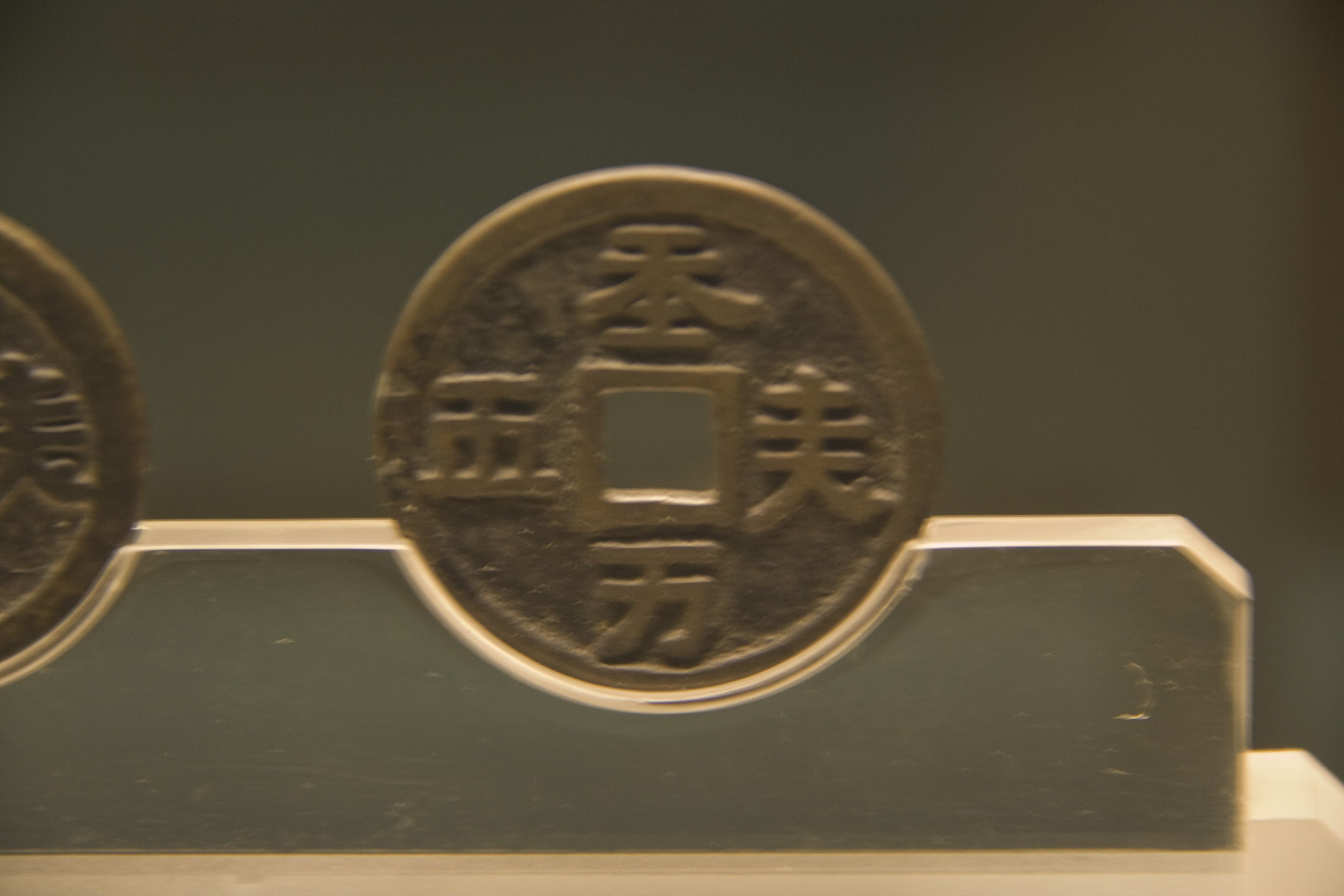 095_20100911_bt_shanghai_museum